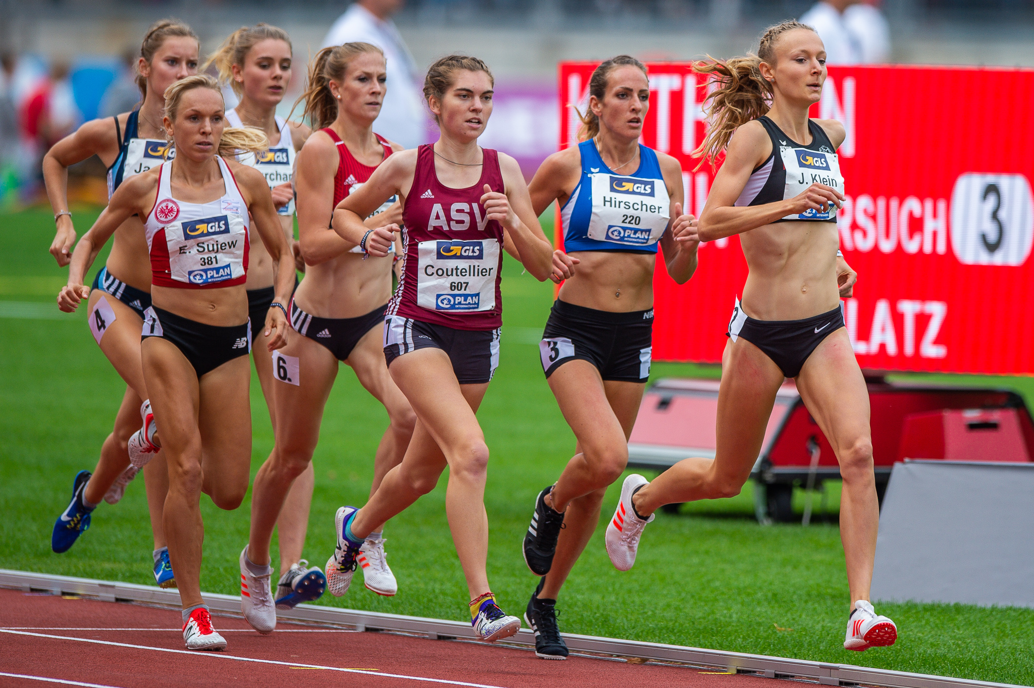 1500-Meter-Lauf,ASV Köln,DLV,Deutsche Leichtathletik Meisterschaften 2018,Deutscher Leichtathletik-Verband,Elina Sujew,Julia Klein,Kerstin Hirscher,LG Eintracht Frankfurt,Max-Morlock-Stadion,SC DHfK Leipzig,TG Viktoria Augsburg,Vera Coutellier